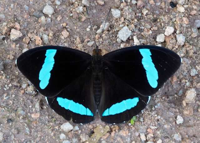 Puente Colorado, La Merced. Peru